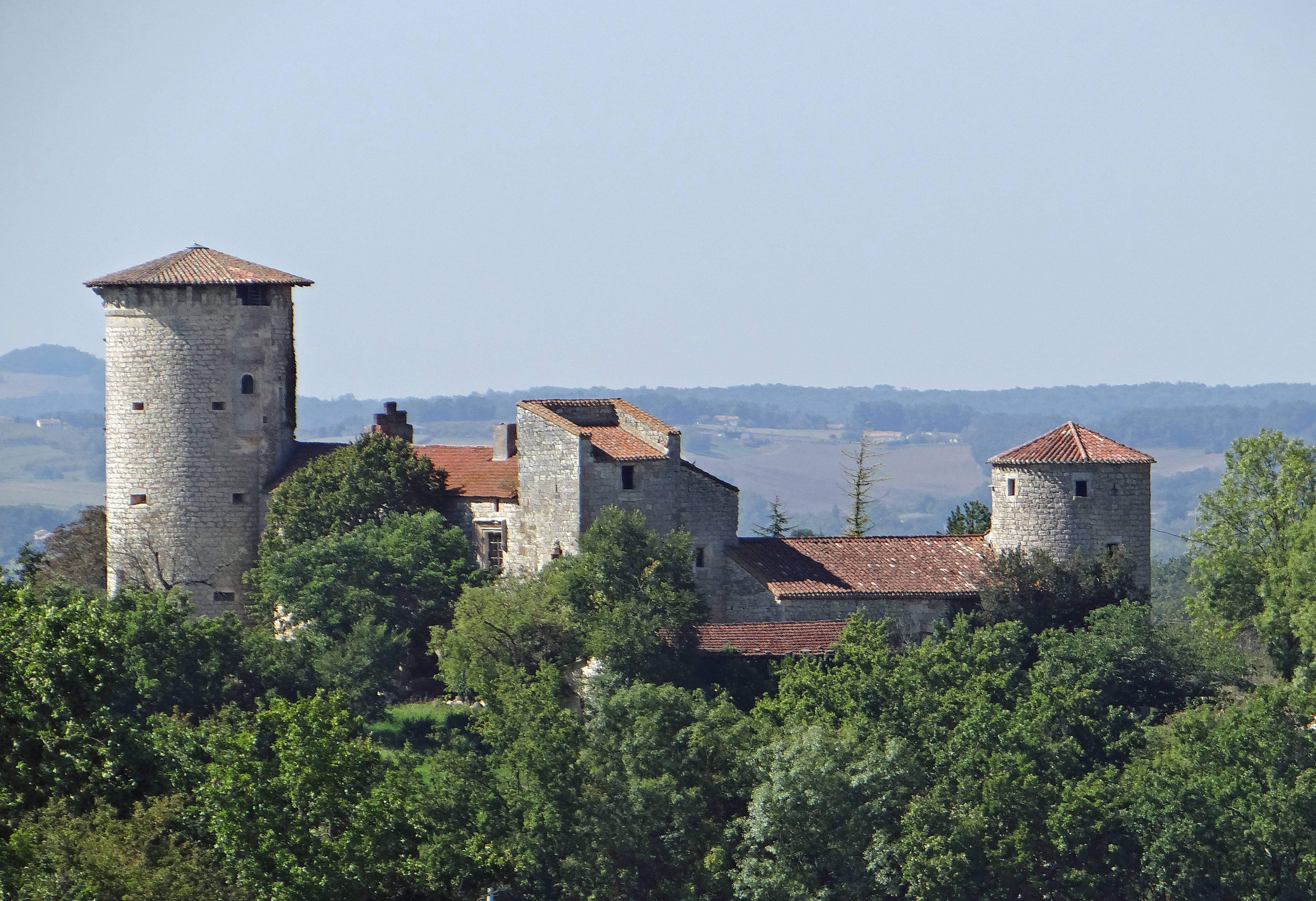 Montayral - Château de Perricard - Vue d'ensemble